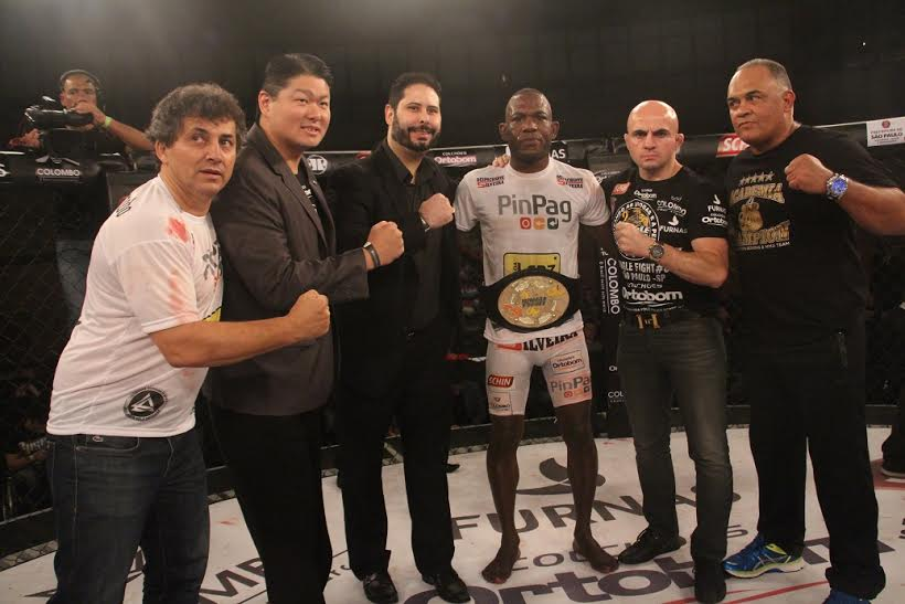 Parrudo luta no Jungle Fight 88